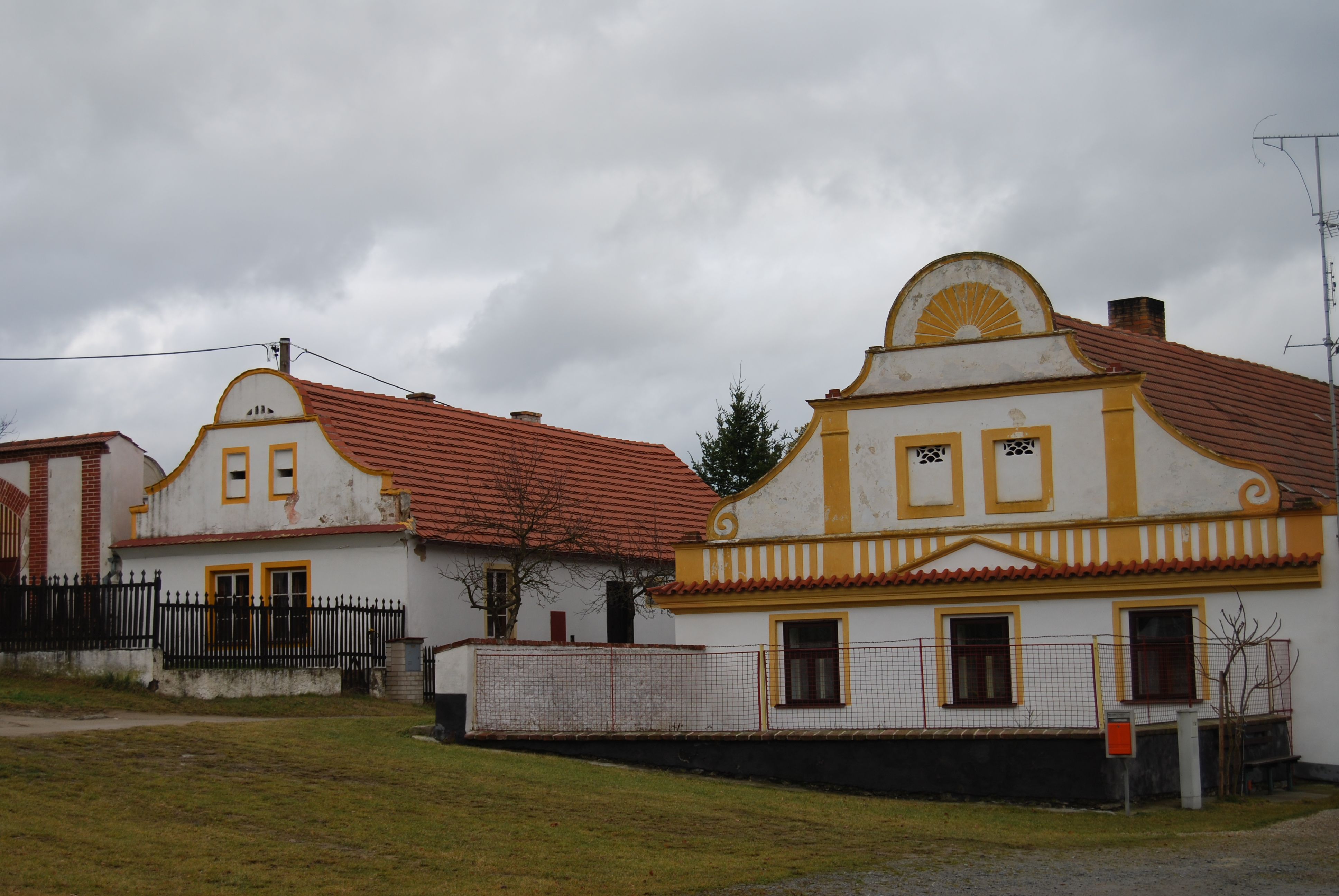 Usedlost čp. 15 a čp. 17 v obci na návsi. Krašovice (Čížová). Okres Písek. Česká republika.